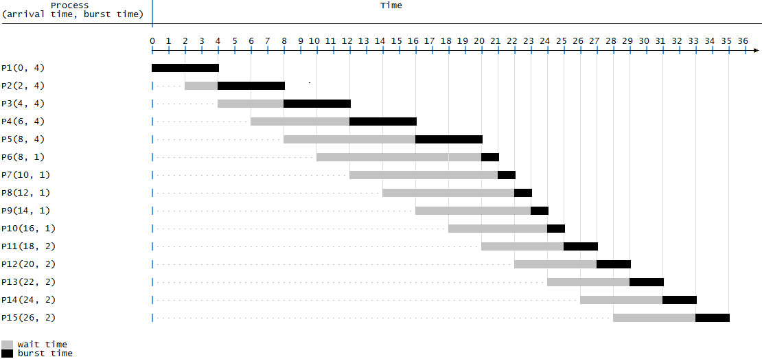 FIFO schedule